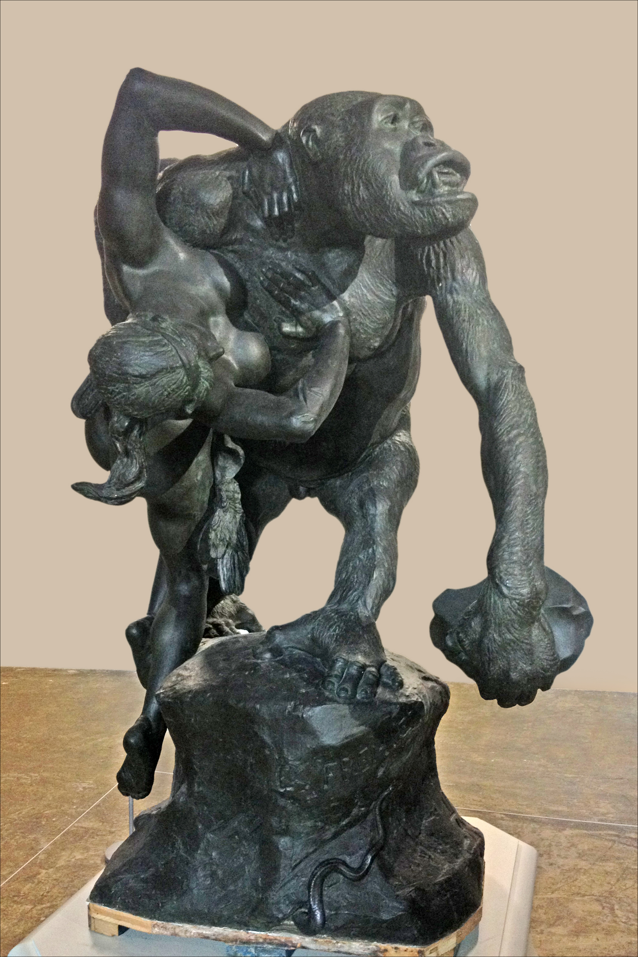 "Gorille enlevant une femme" Oeuvre d'Emmanuel Frémiet (1824-1910) 1887 Plâtre teinté oeuvre conservée au musée des beaux-arts de Nantes présentée par Alain Séchas au Palais de Tokyo dans le cadre de la manifestation "Sans cimaise et sans pantalon" (Parcours hors centre-ville du "Voyage à Nantes" 2012) site du palais de Tokyo Photo iphone